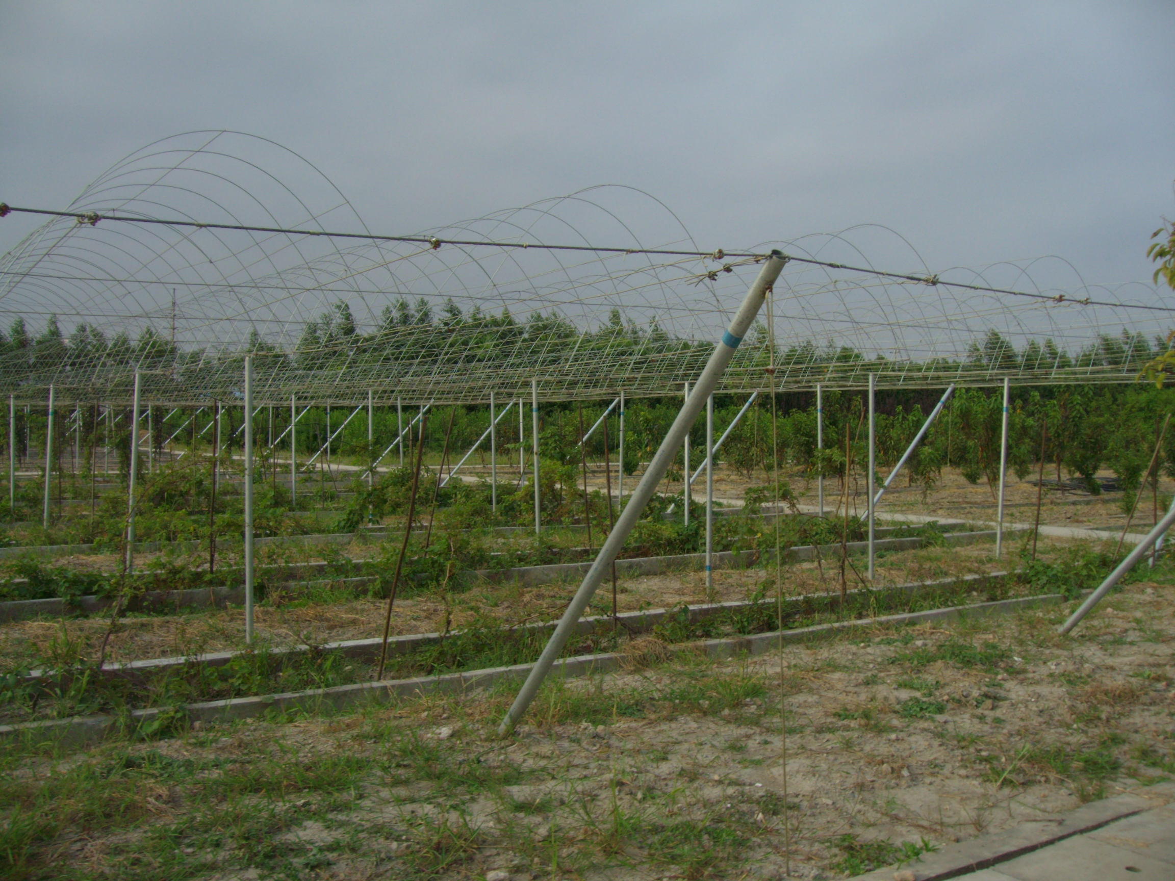 上海交通大学农业与生物学院试验田